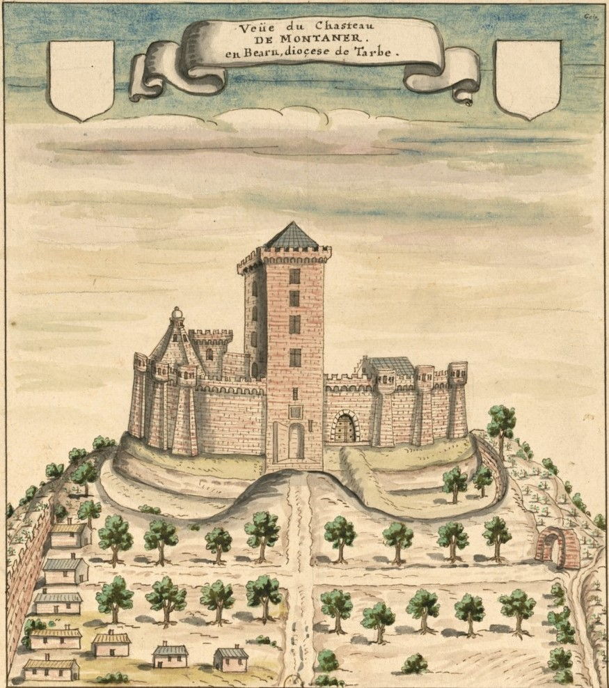 Château de Montaner sous Fébus. Vue d'artiste réalisée en 1704 par Louis Bouban, avec la mention "Veüe du Chasteau de Montaner, en Bearn, diocèse de Tarbe : Gaston Phebus comte de Foix fit bastir ce chasteau avant l'an 1400"